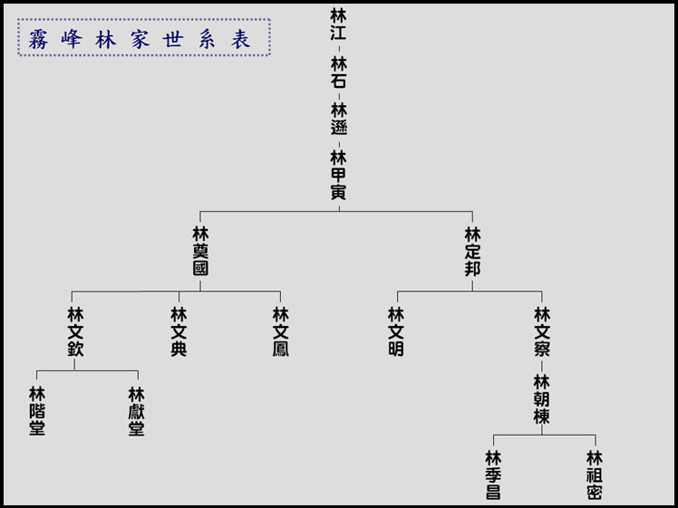 霧峰林家世系表 由Kaurjmeb製作，請Jasonzhuocn代為發佈。